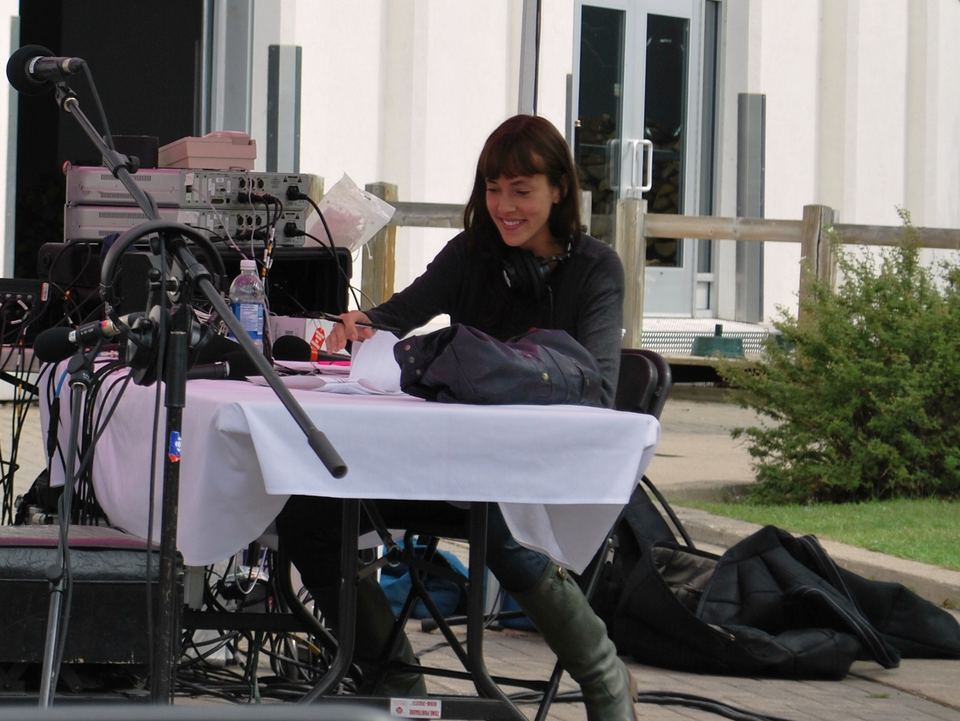 Catherine Pogonat au Vieux-Port de Chicoutimi.